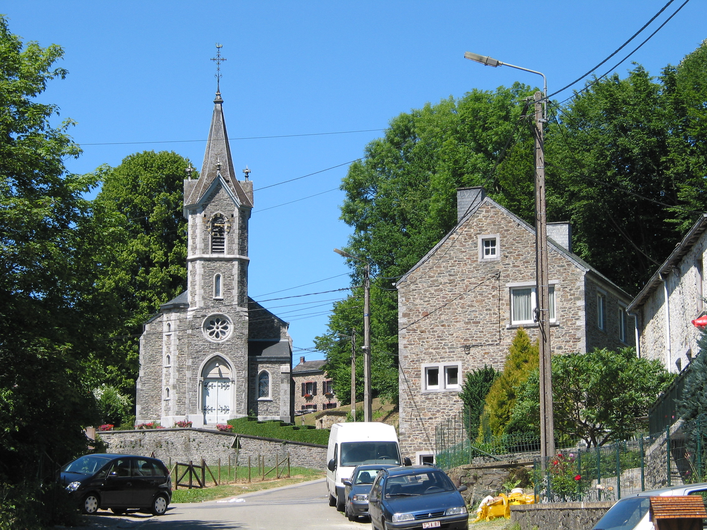 l'élise Saint-fiacre (1887-1888), Membre, Belgique